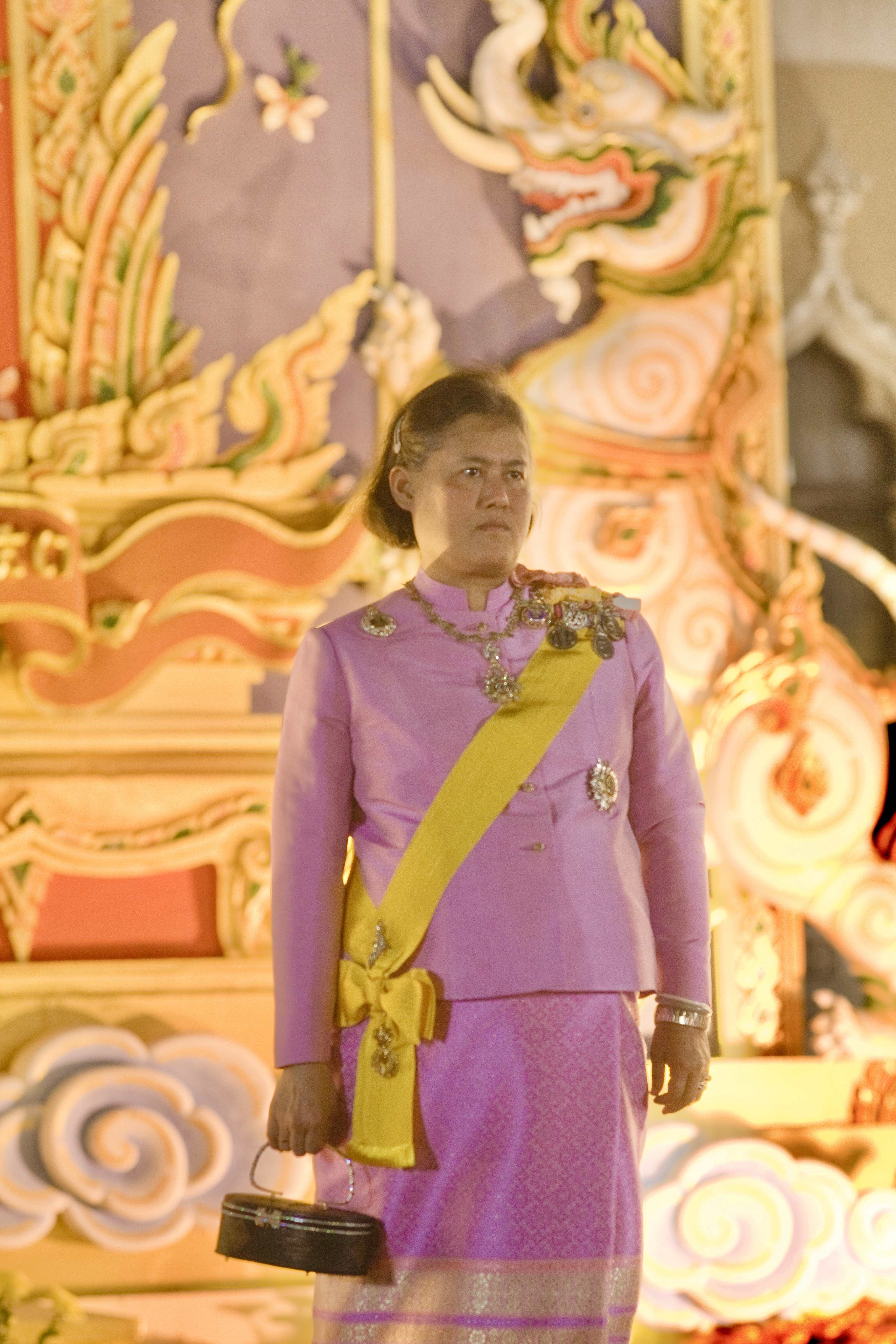 นายกรัฐมนตรี และภริยา เฝ้าฯ รับเสด็จ สมเด็จพระเทพรัตนราชสุดาฯ สยามบรมราชกุมารี เสด็จพระราชดำเนินพร้อมด้วยพระบรมวงศานุวงศ์ในงานสโมสรสันนิบาตเฉลิมพระเกียรติพระบาทสมเด็จพระเจ้าอยู่หัว เนื่องในโอกาสมหามงคลเฉลิม พระเกียรติพระชนมพรรษา วันอังคารที่ 7 ธันวาคม พ.ศ.2553 (Photographer attached to the Prime Minister of the Kingdom of Thailand : Peerapat Wimolrungkarat / พีรพัฒน์ วิมลรังครัตน์) @is50mm